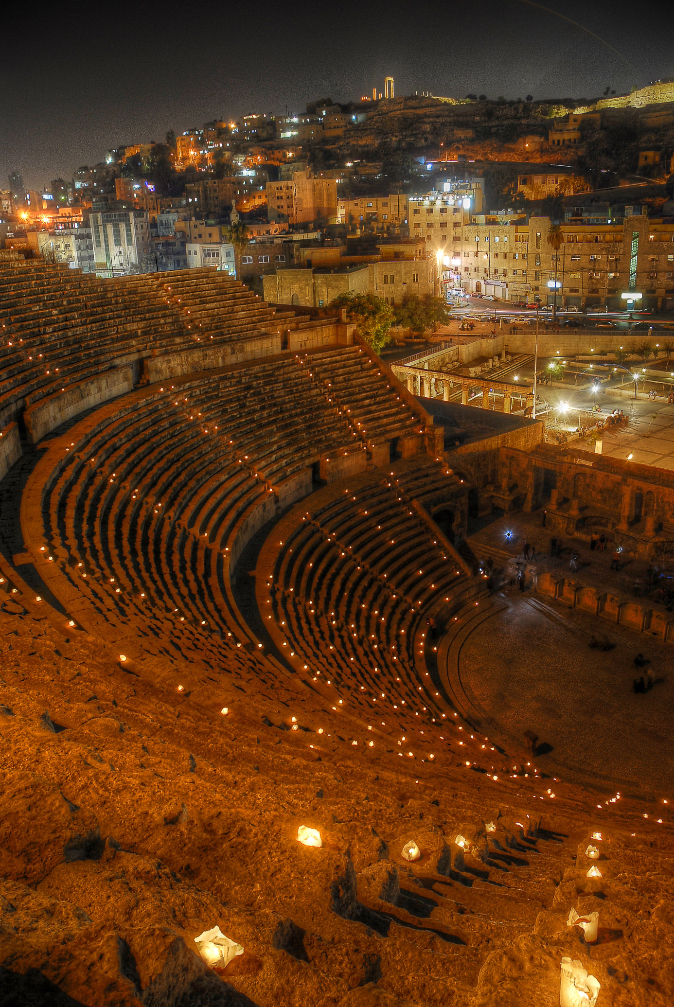 صورة توضح المرج الروماني في العاصمة عمان/الأردن في الفترة المسائية حيث تظهر جمالات الإضاءة